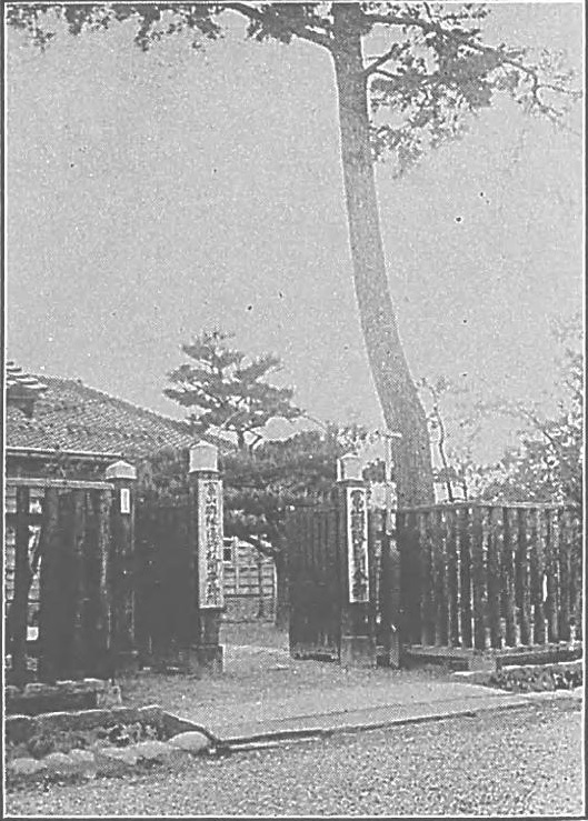 説明文に「富山市千石町に在り越中東部の一市四郡及び飛驒三郡を管轄す」とあり